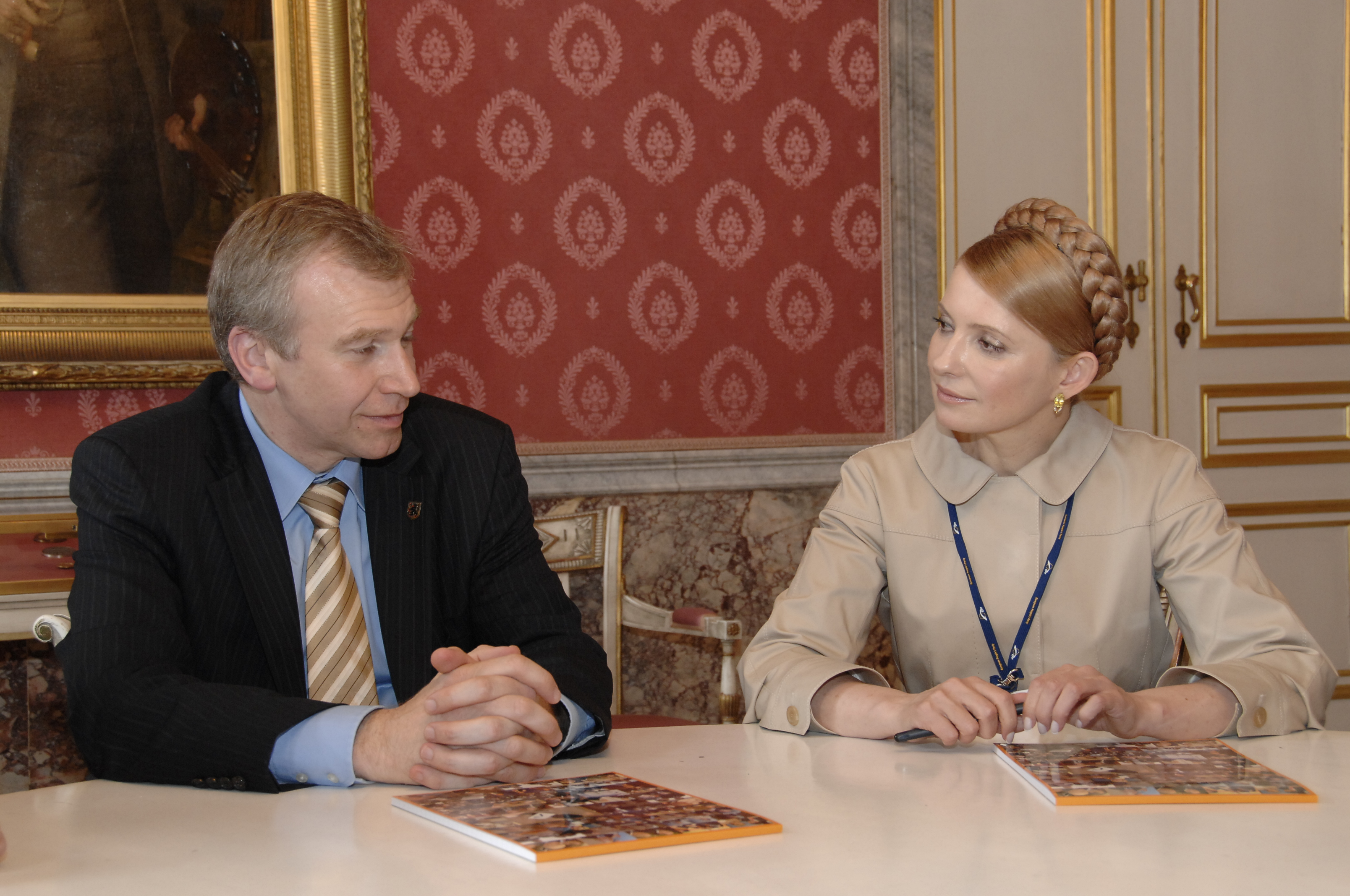 EPP Summit 19 June 2008